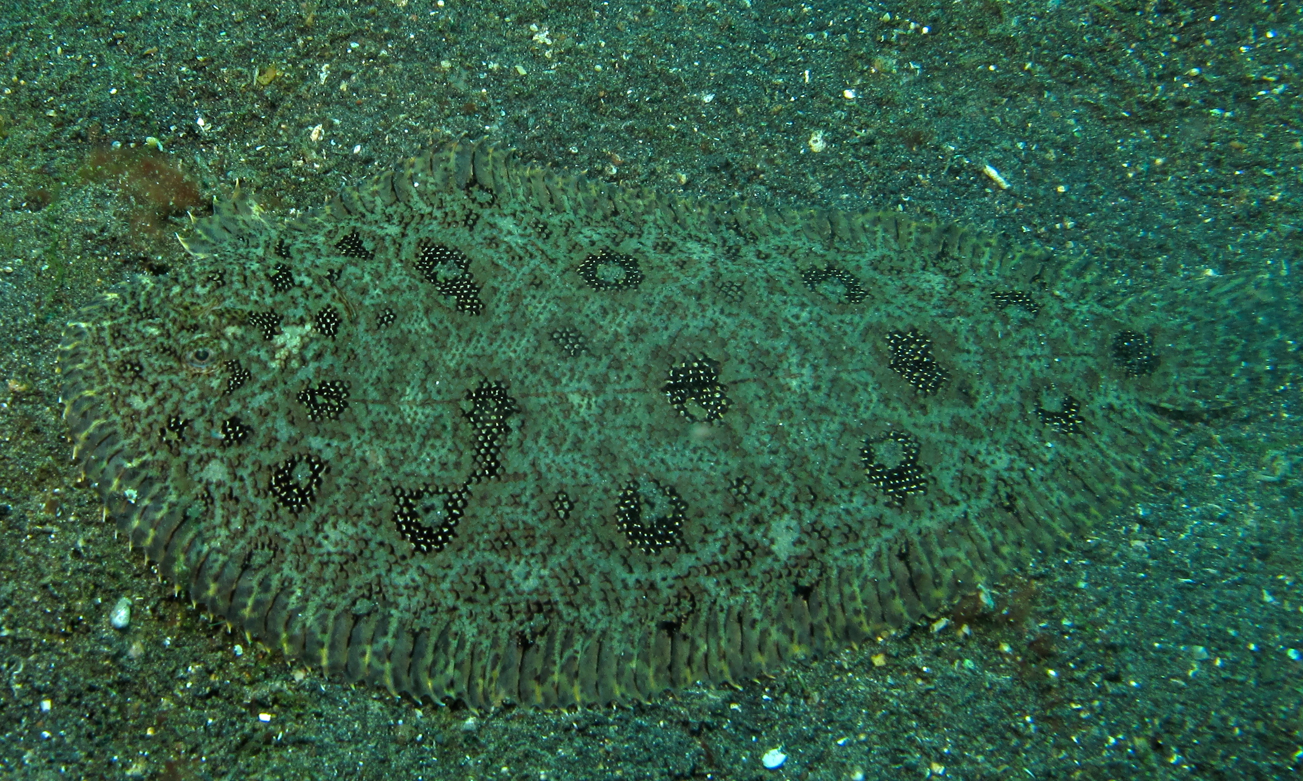 Teluk Temahu III, Lembeh Strait, Sulawesi, INDONESIA